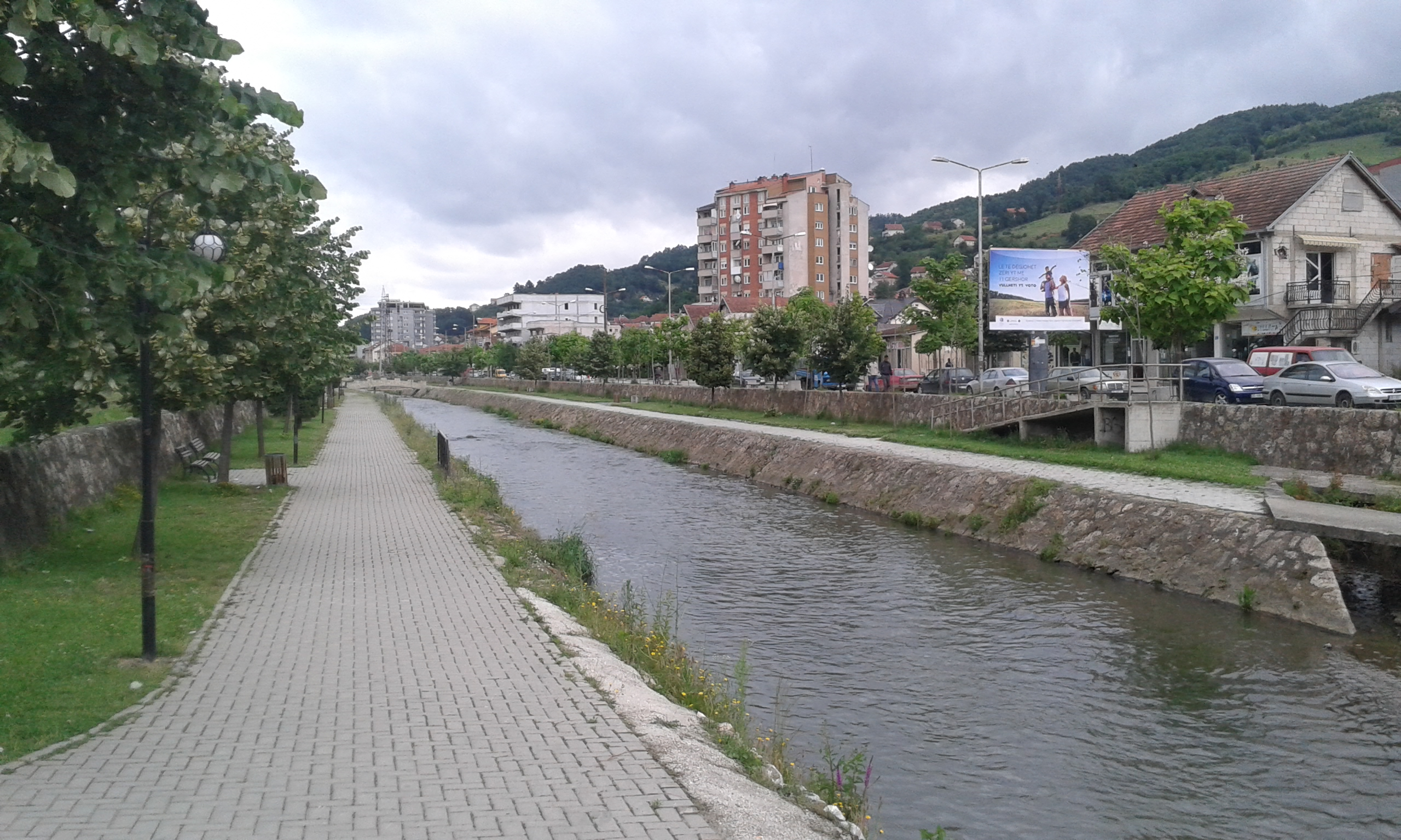 Die Promenade am Lepenca in Kacanik.